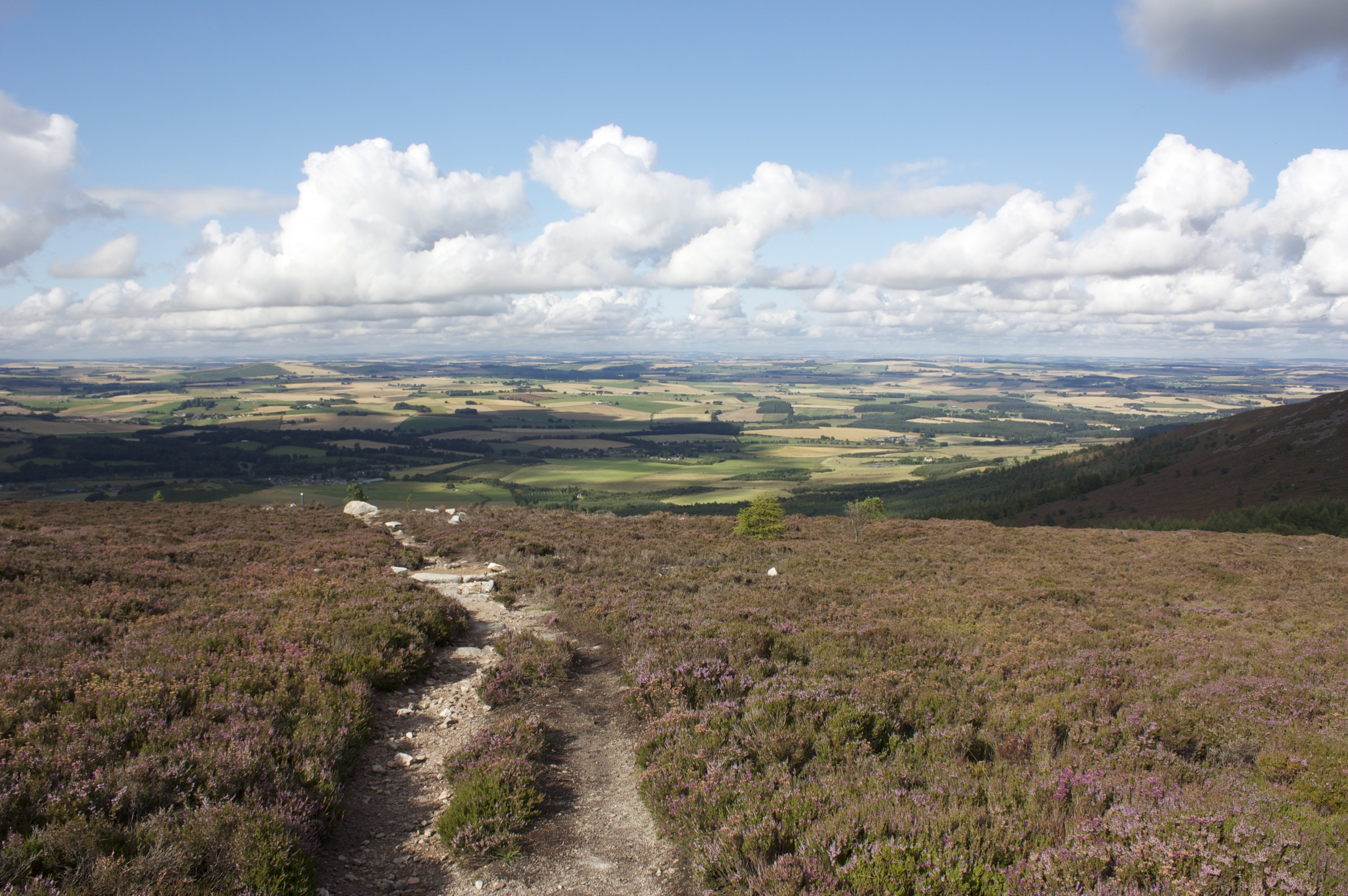 Aberdeenshire from Benachie